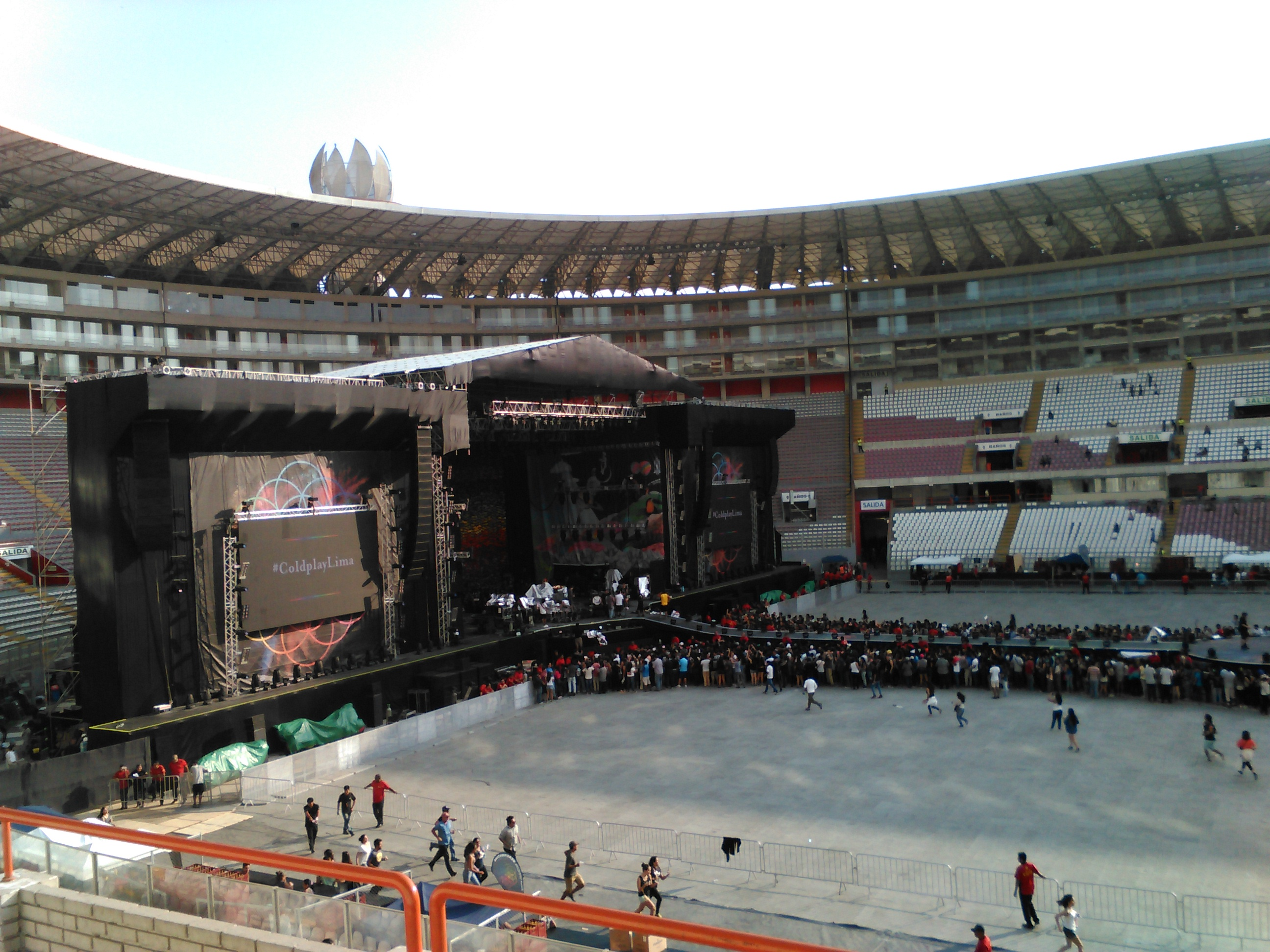 Escenario de la gira "A Head Full of Dreams" en su etapa por Latinoamerica. Concierto Realizado en el Estadio Nacional del Perú (Lima).